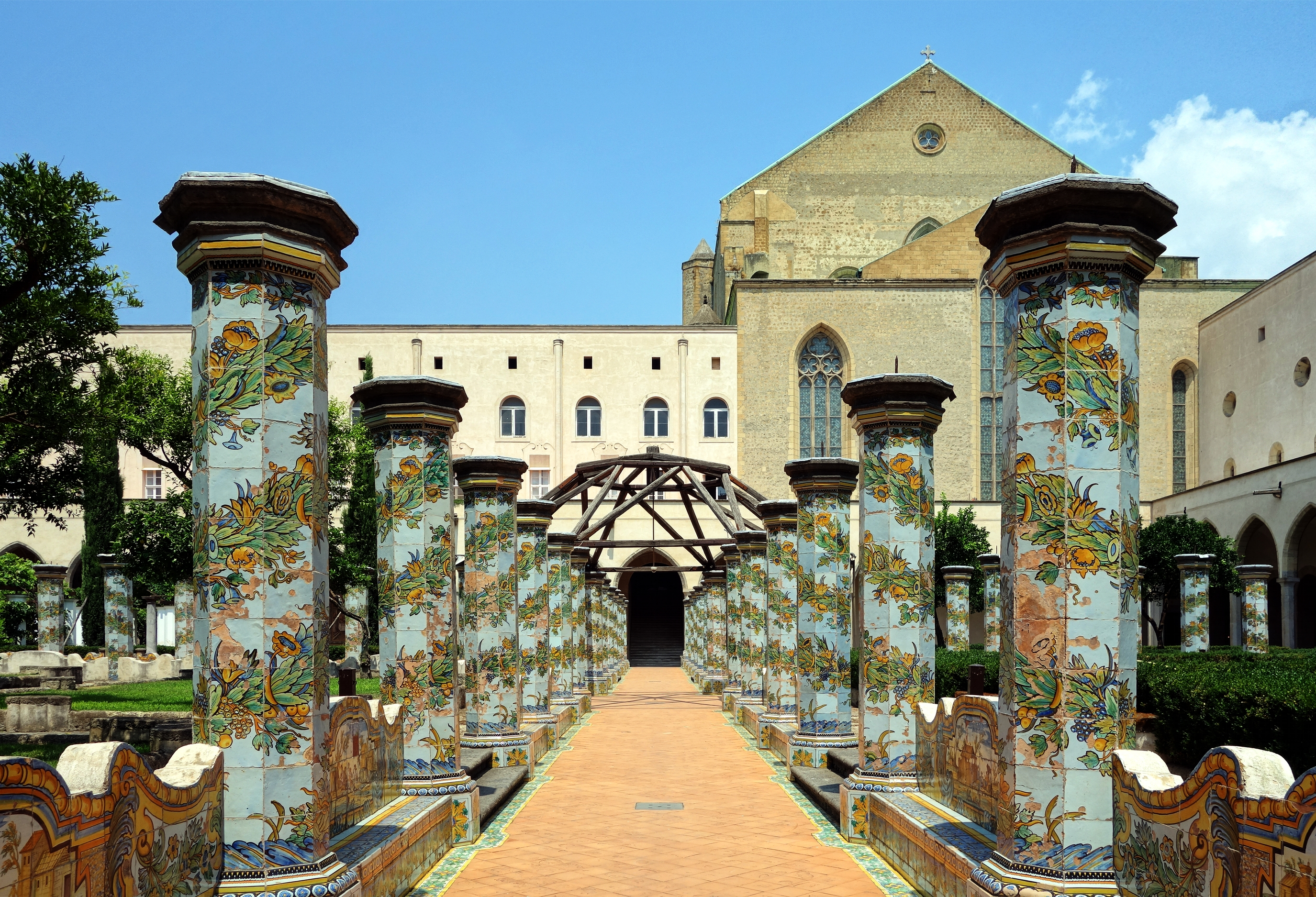 Le cloître de Santa Chiara à Naples.